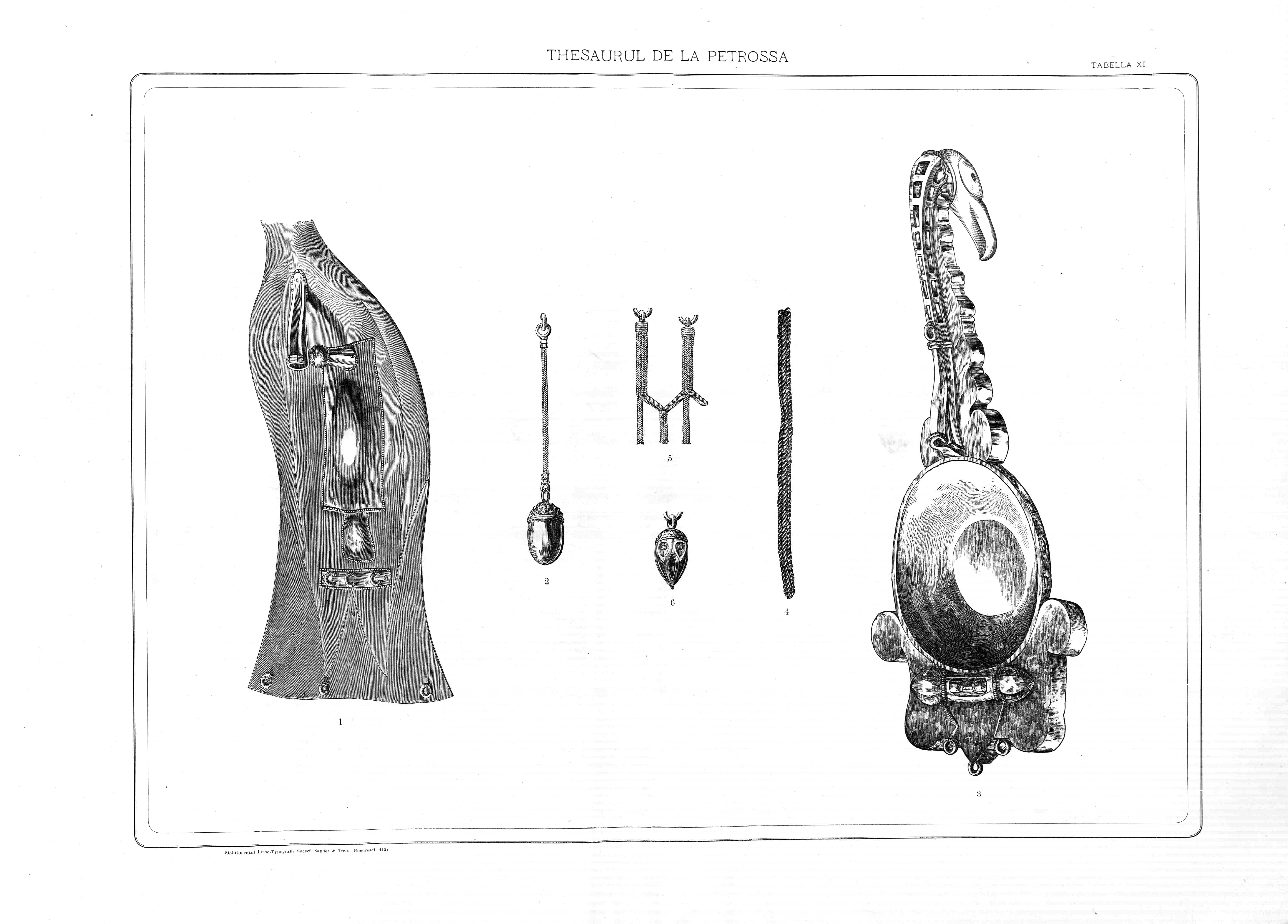 Detalii ale paftalelor